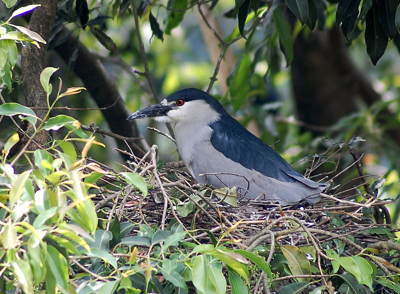 Jardim Botânico de São Paulo